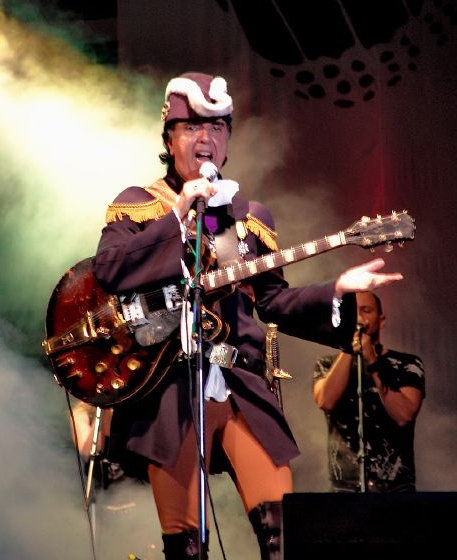 Sérgio Dias num espetáculo d'Os Mutantes, 2007